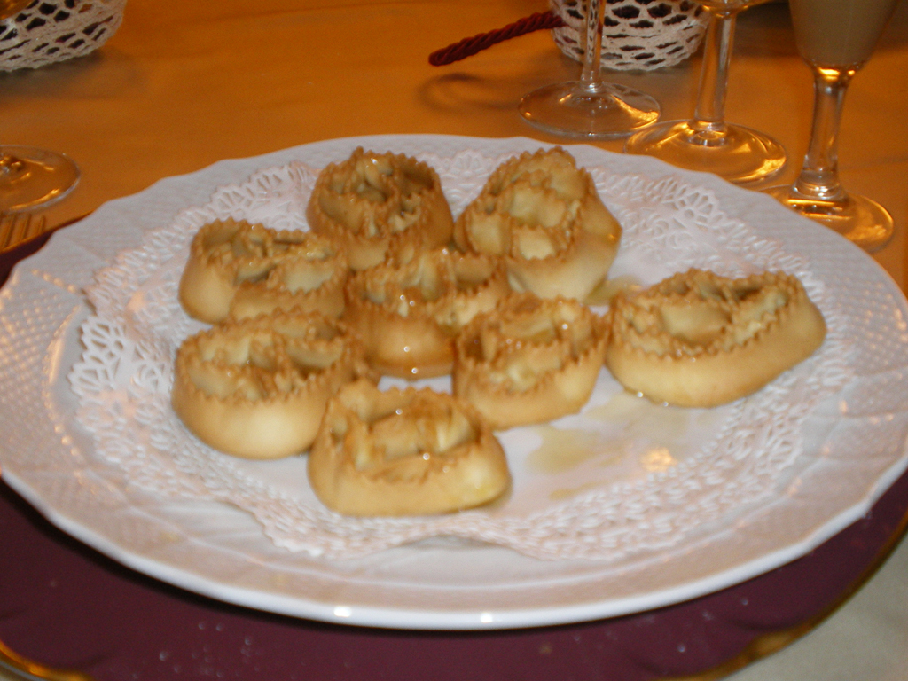 cartellate cerignolane al miele